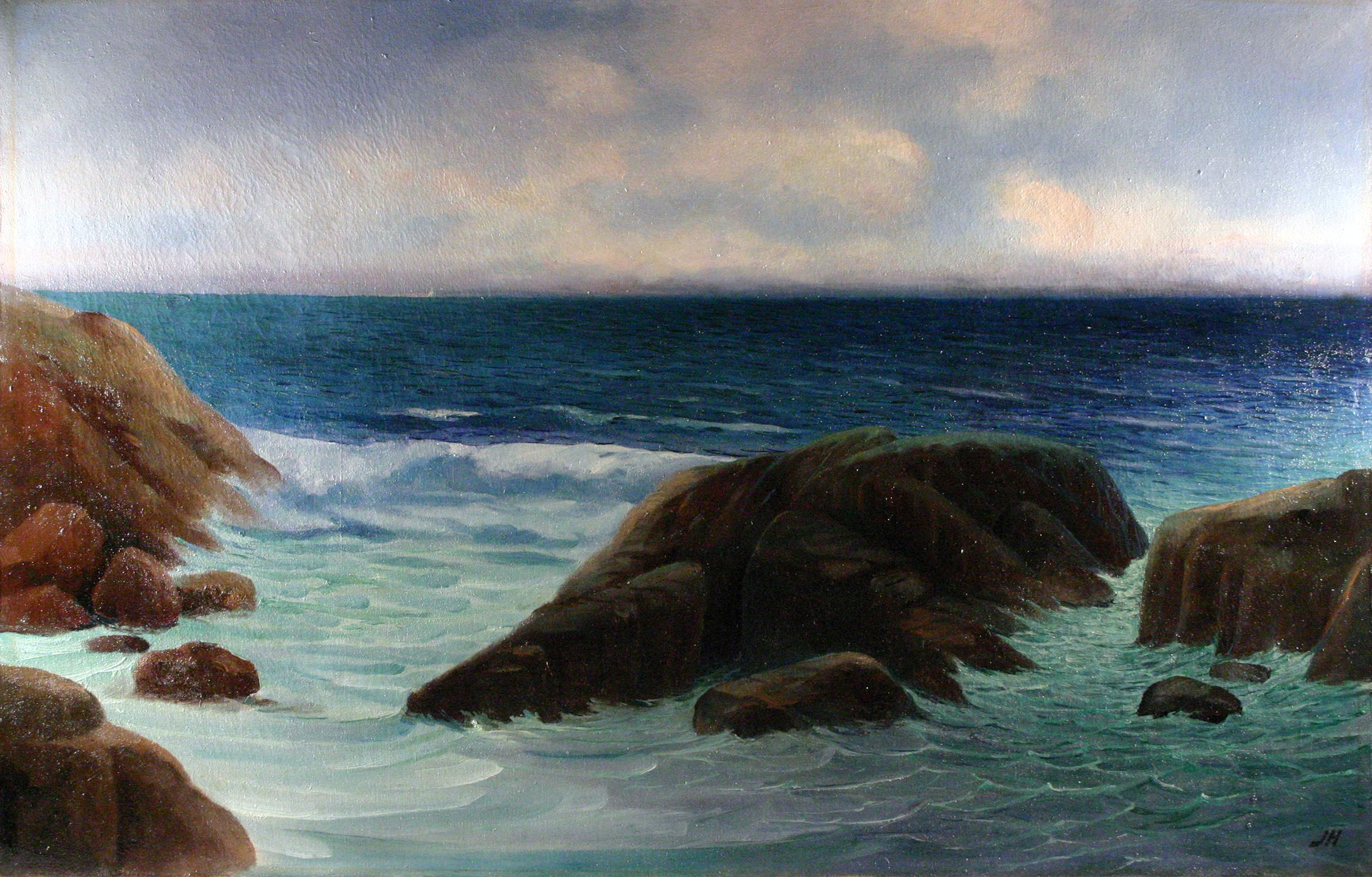 Josip Horvat: Pred burom, oko 1936. Slika s poluotoka Pelješca - Trpanj